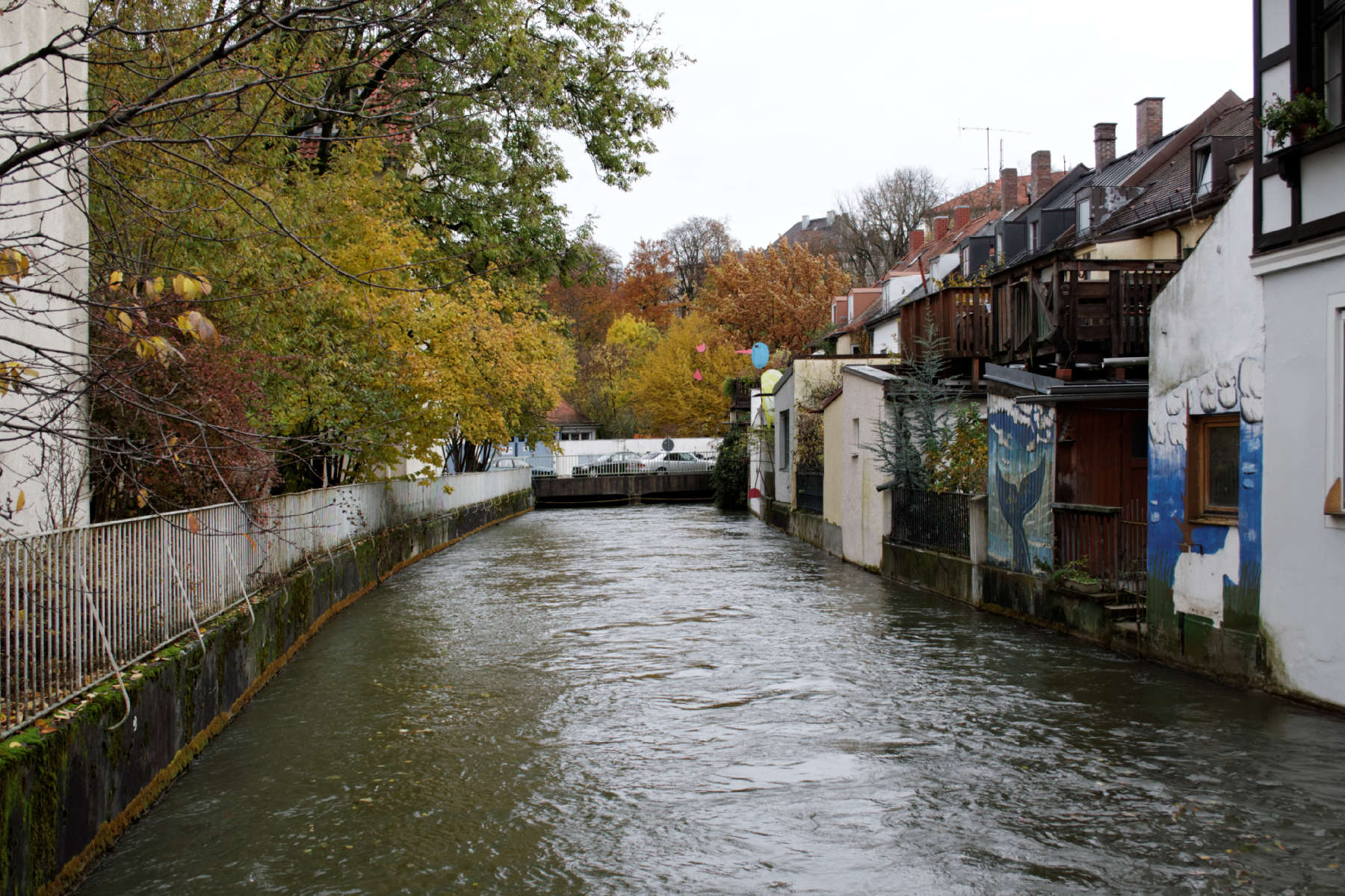 München, Auer Mühlbach an der Rückseite der Häuser an der Mondstraße in Giesing